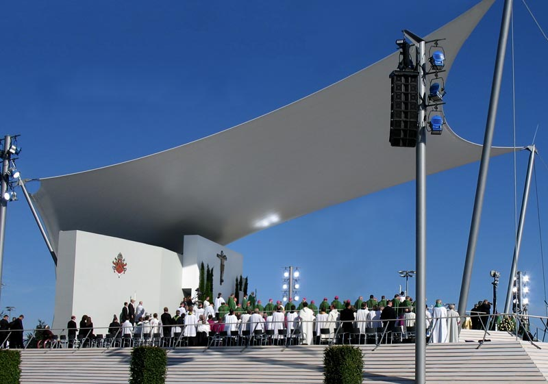 Paspst in Muenchen